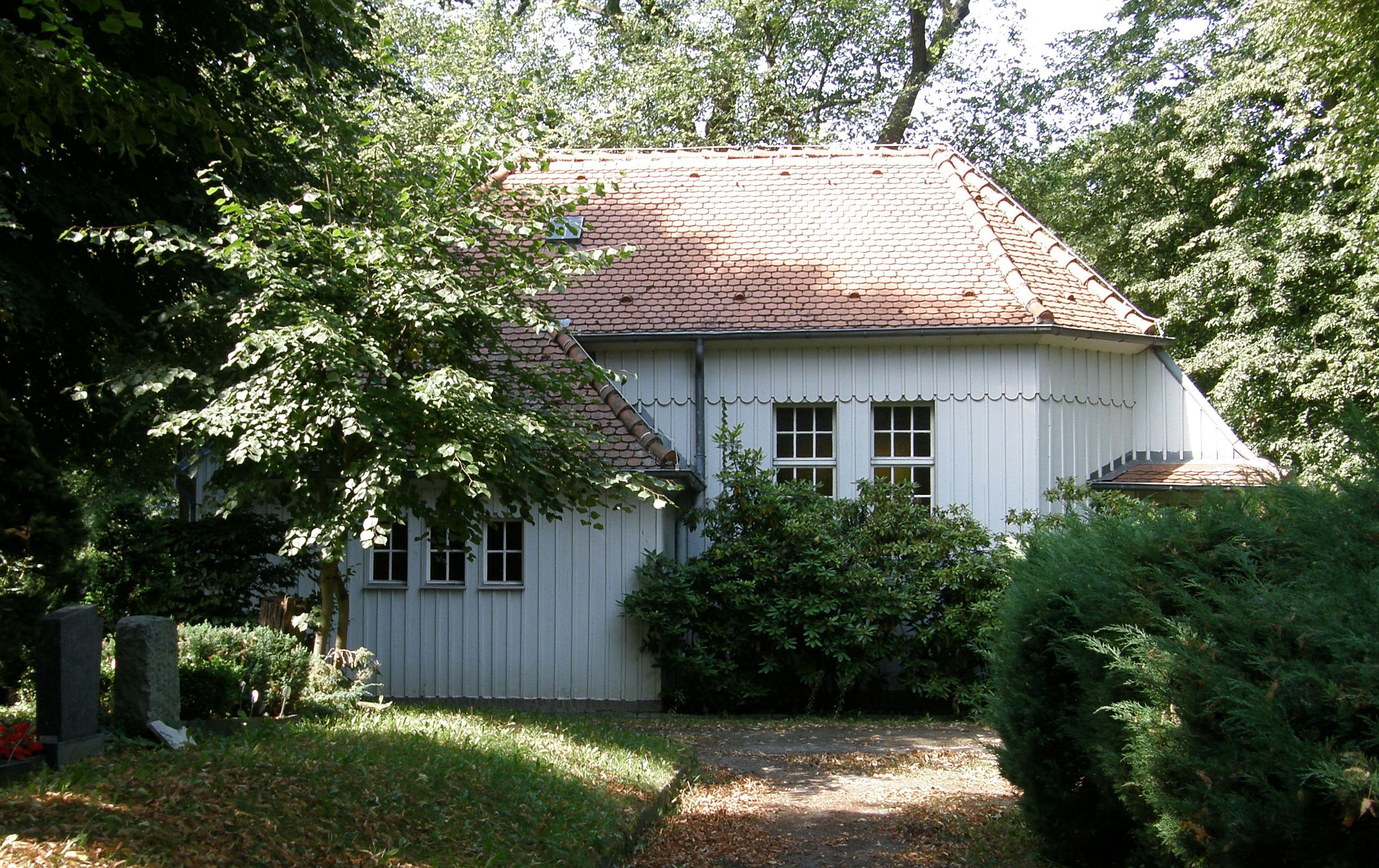 Friedhof Dahlem: Trauerhalle. Architekten: Friedrich Hennings und Wilhelm Hennings.